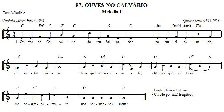 Hino mixolídio do século XIX